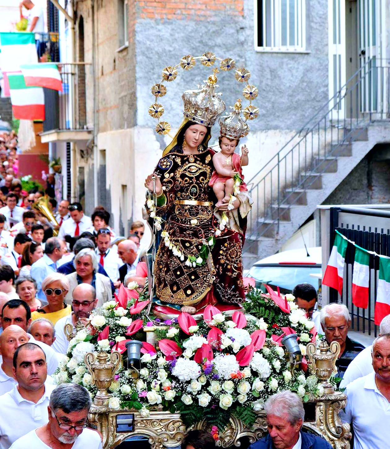 statua della Madonna della Catena di roccalumera in processione.